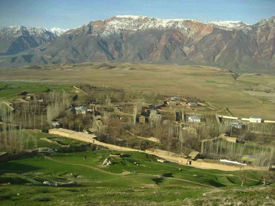 District khvahan,شهرستان خوهان,шаҳристон хоҳон!